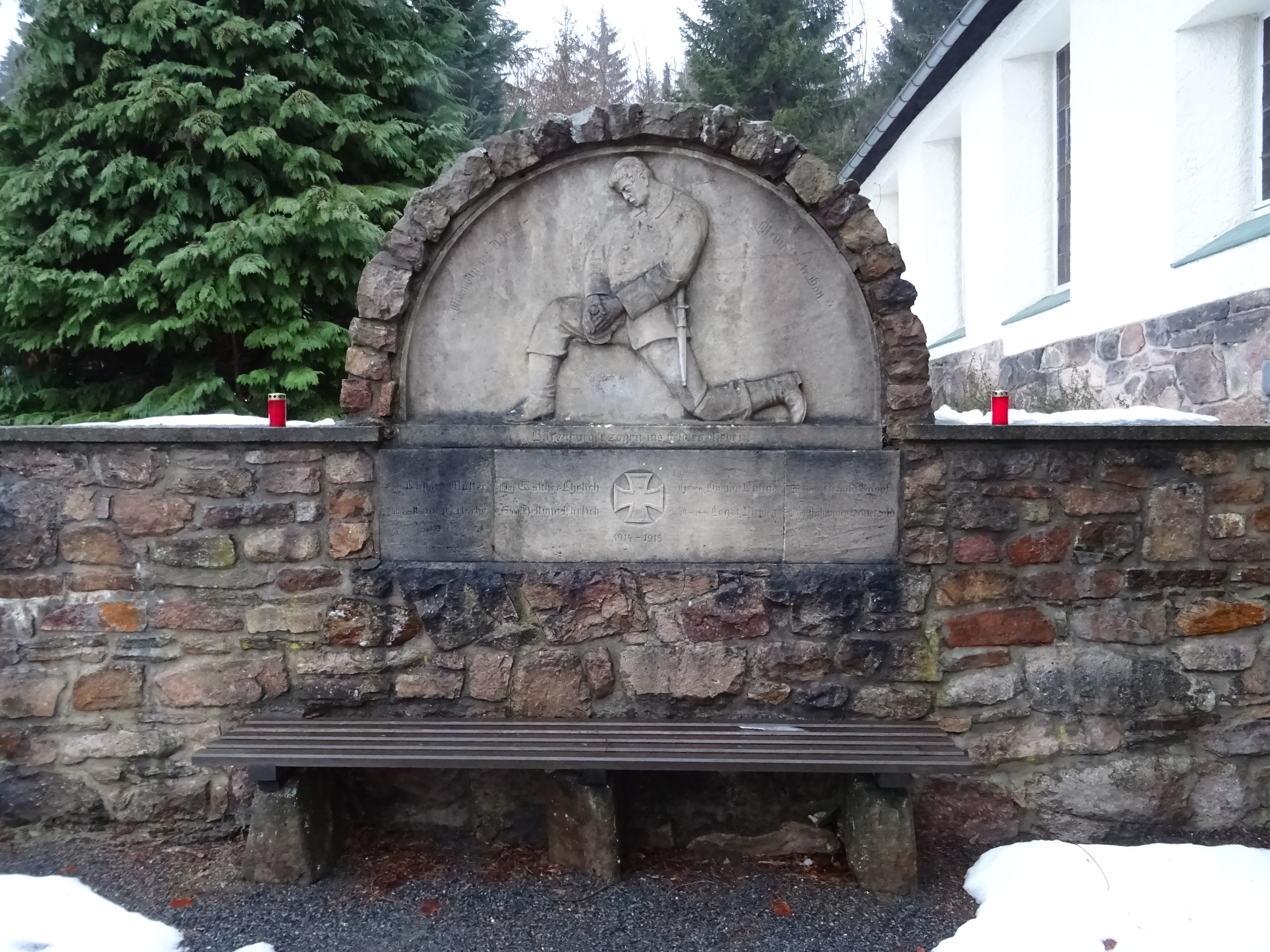 Oberbärenburg; evangelische Waldkapelle im Winter, Mahn-und Denkmal der Opfer des 1.Weltkrieges